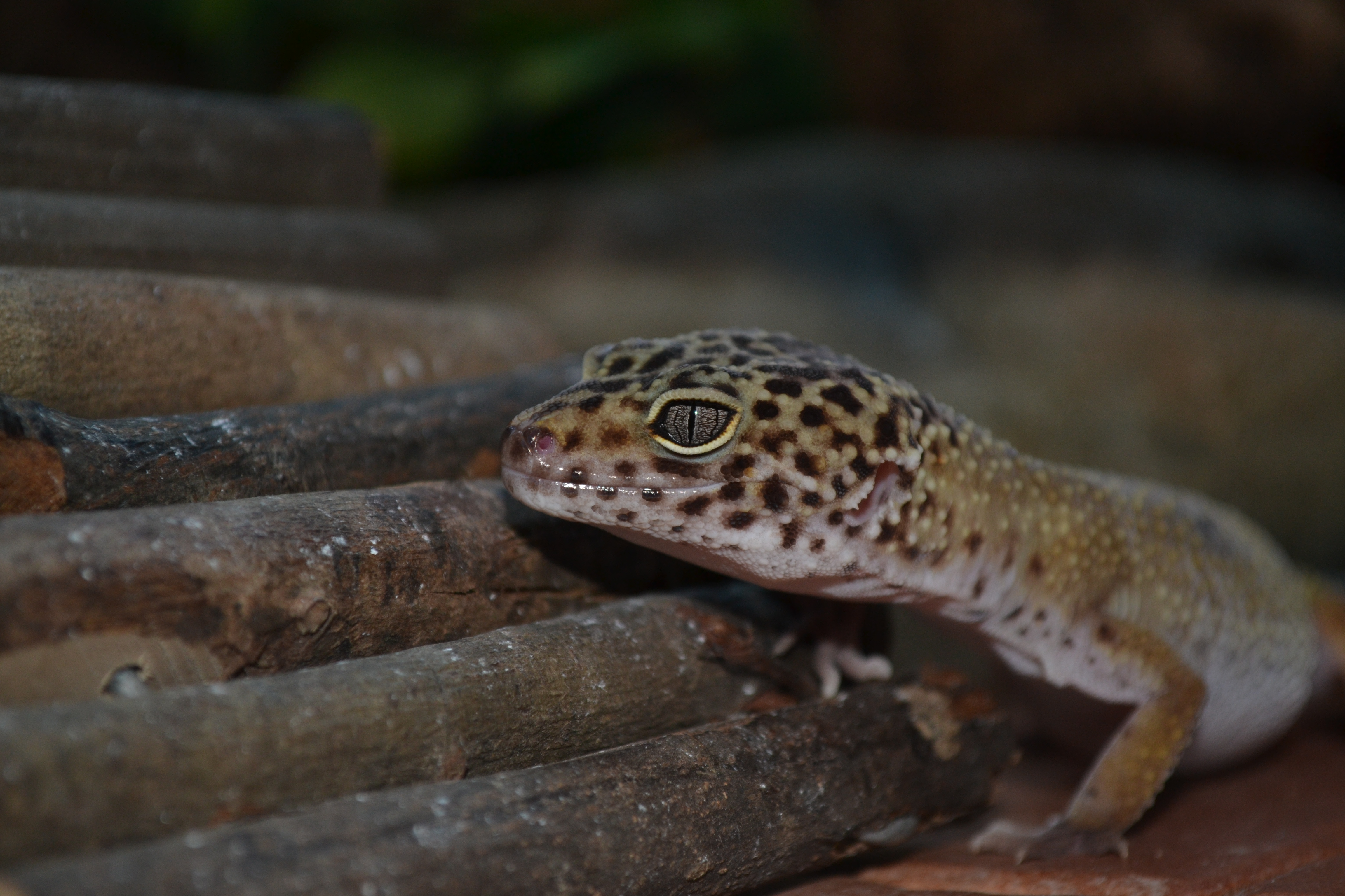 Leopardgekko